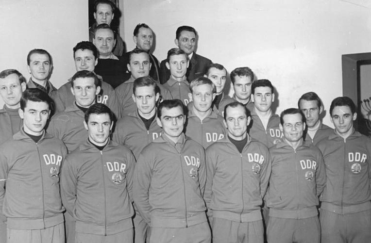 Zentralbild-Kohls wen-pr 13.1.1967 Berlin: Fußball-Nationalmannschaft der DDR geht auf Afrika-Tournee. Die Mannschaft mit den Spielern (untere Reihe v.l.n.r.) Irmscher, Nachtigall, Frässdorf, Geisler, Roland Ducke, Frenzel. Zweite Reihe v. unten (v.l.n.r.): Backhaus, Torhüter Blochwitz, Bransch, Walter, Vogel und Torhüter Weigang. Dritte Reihe von unten (v.l.): Urbanczyk, Erler, [Jürgen] Nöldner, Feister, Stein und Körner. Obere Reihe (v.l.): Nationaltrainer K. Soos, Verbandstrainer Wolf, Delegationsleiter Schneider und Masseur Schenk (ganz oben). Information: Die DDR-Fußball-Nationalmannschaft rüstet zu großer Fahrt. Die Schützlinge von Trainer Karoly Soos treten am 15.1.1967 vom Zentralflughafen Berlin-Schönefeld aus die Reise nach Afrika an und tragen insgesamt zehn Spiele in der VAR, im Sudan und Guinea aus.